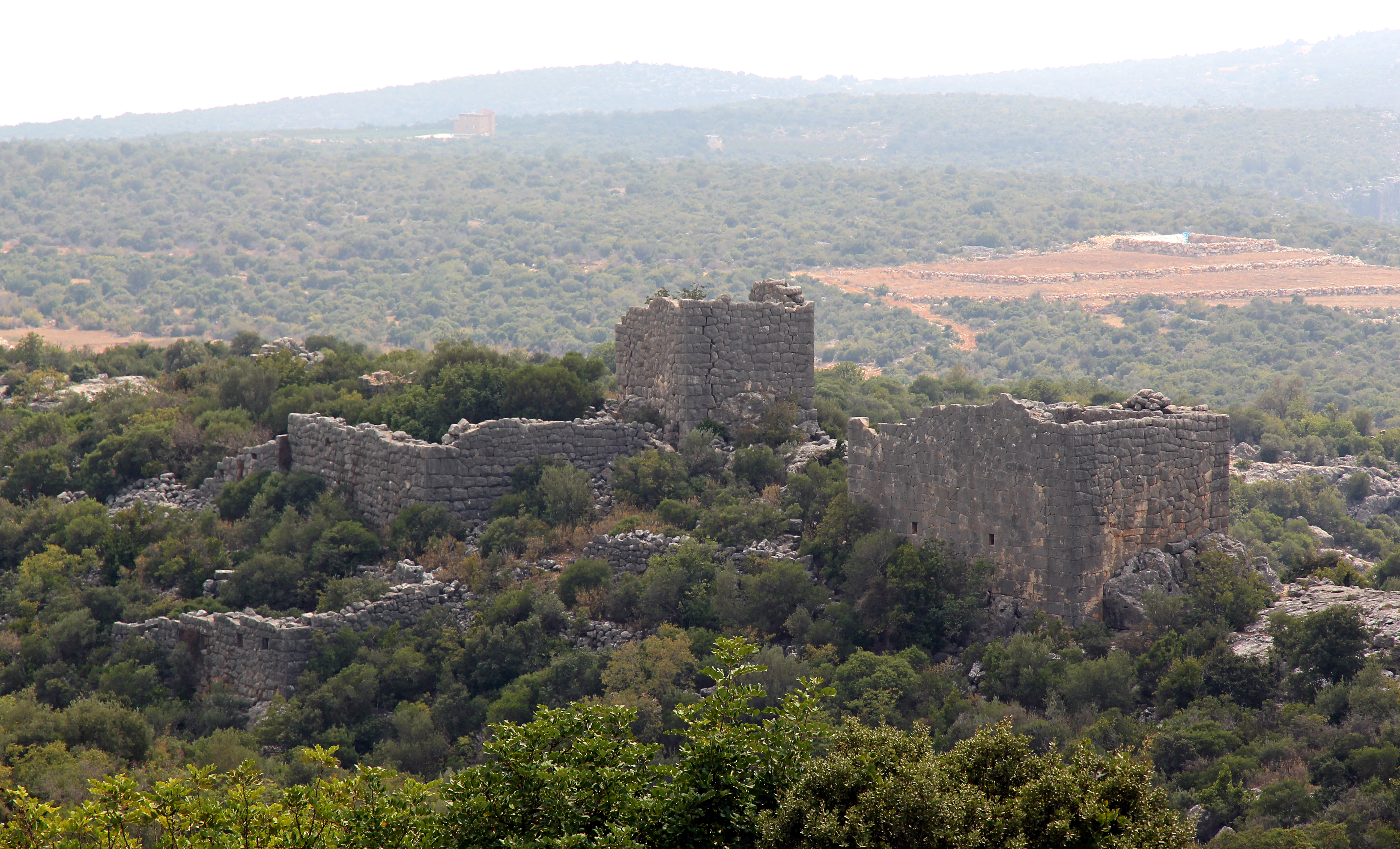 Çatıören, römische Siedlung nahe Kızkalesi, Südtürkei, rechts Hermestempel, dahinter olbischer Turm, links römische Häuser